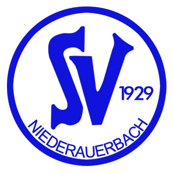 SV Niederauerbach-Logo